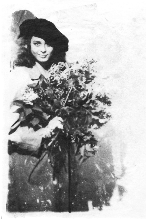 Forgács Zsuzsa magyar író.